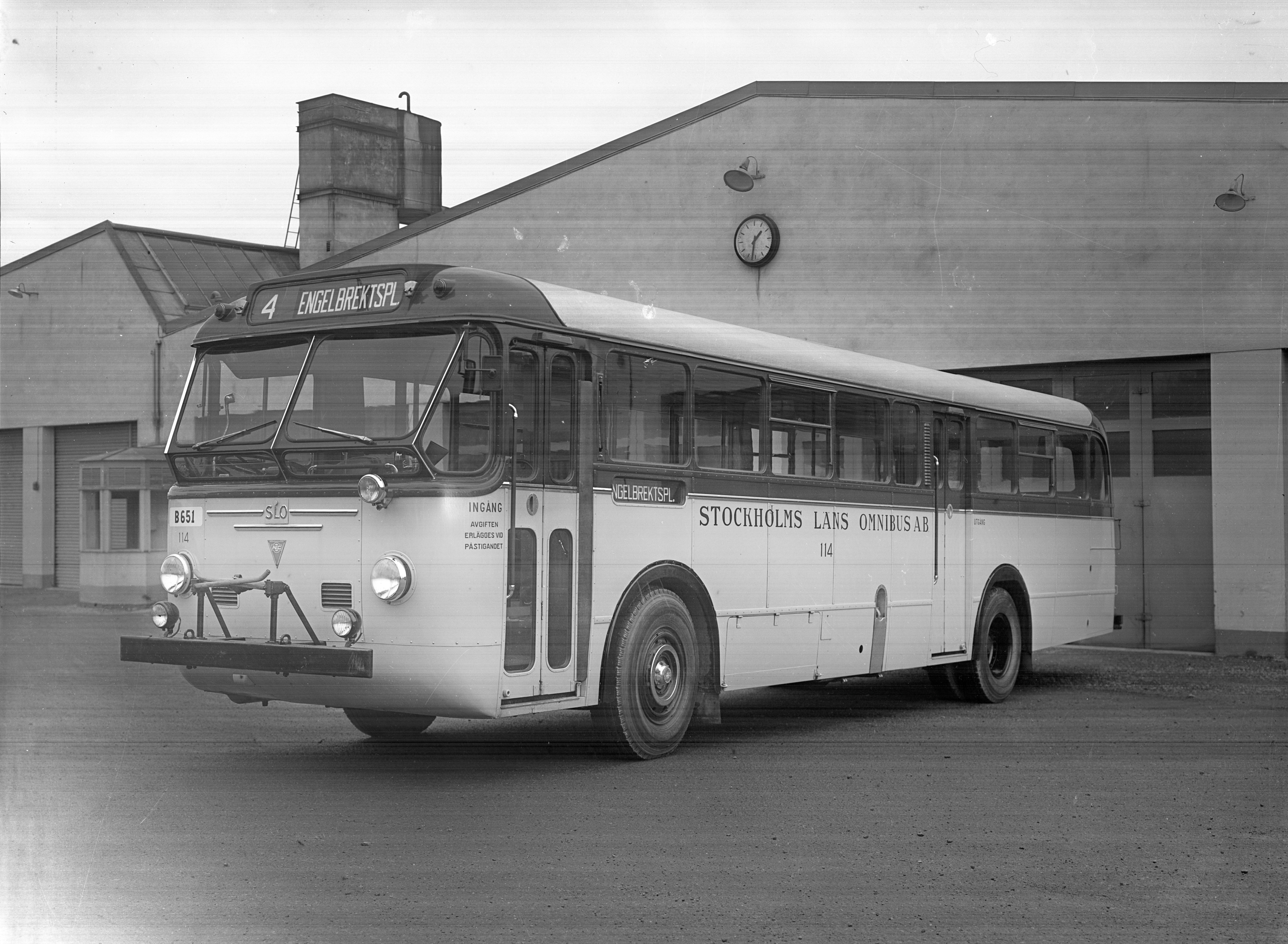 SLO buss skyltad som linje 4 mot Engelbrektsplan uppställd utanför bussgaraget i Enebyberg.